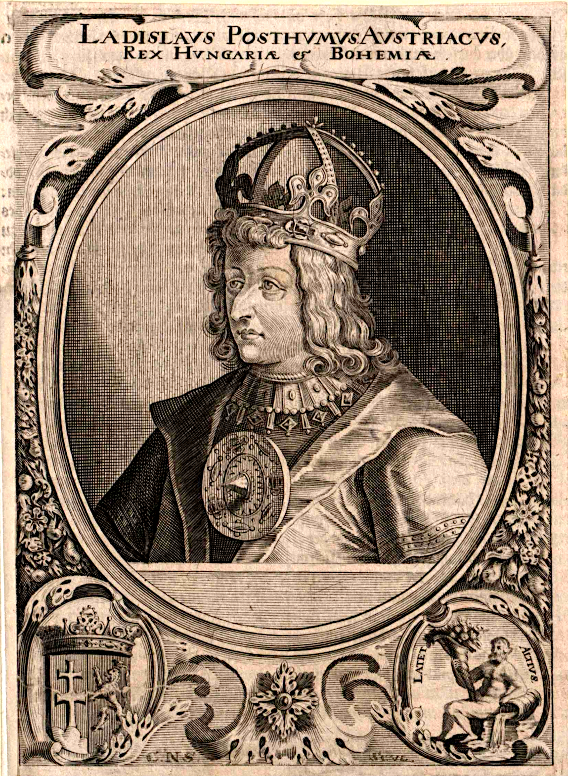 adislaus Postumus, König von Ungarn (1440 - 1457)